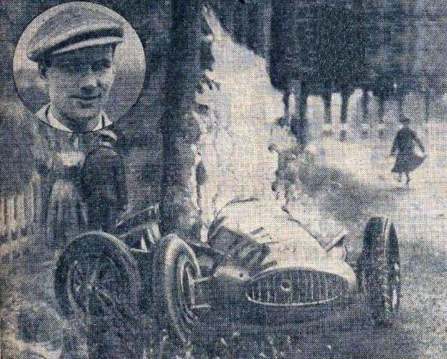 L'accident de Richard Seaman (1939 à Spa)